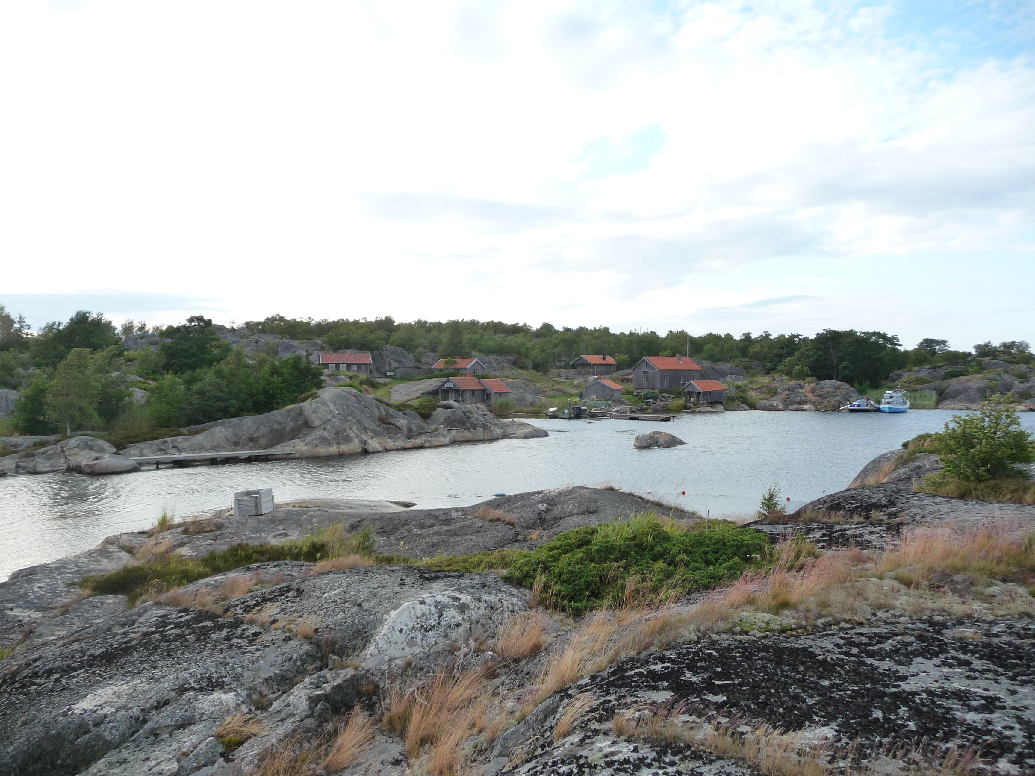 Stora Bonden, Stora Nassa skärgård. Det enda bebyggda området, och det enda område som inte är naturreservat.